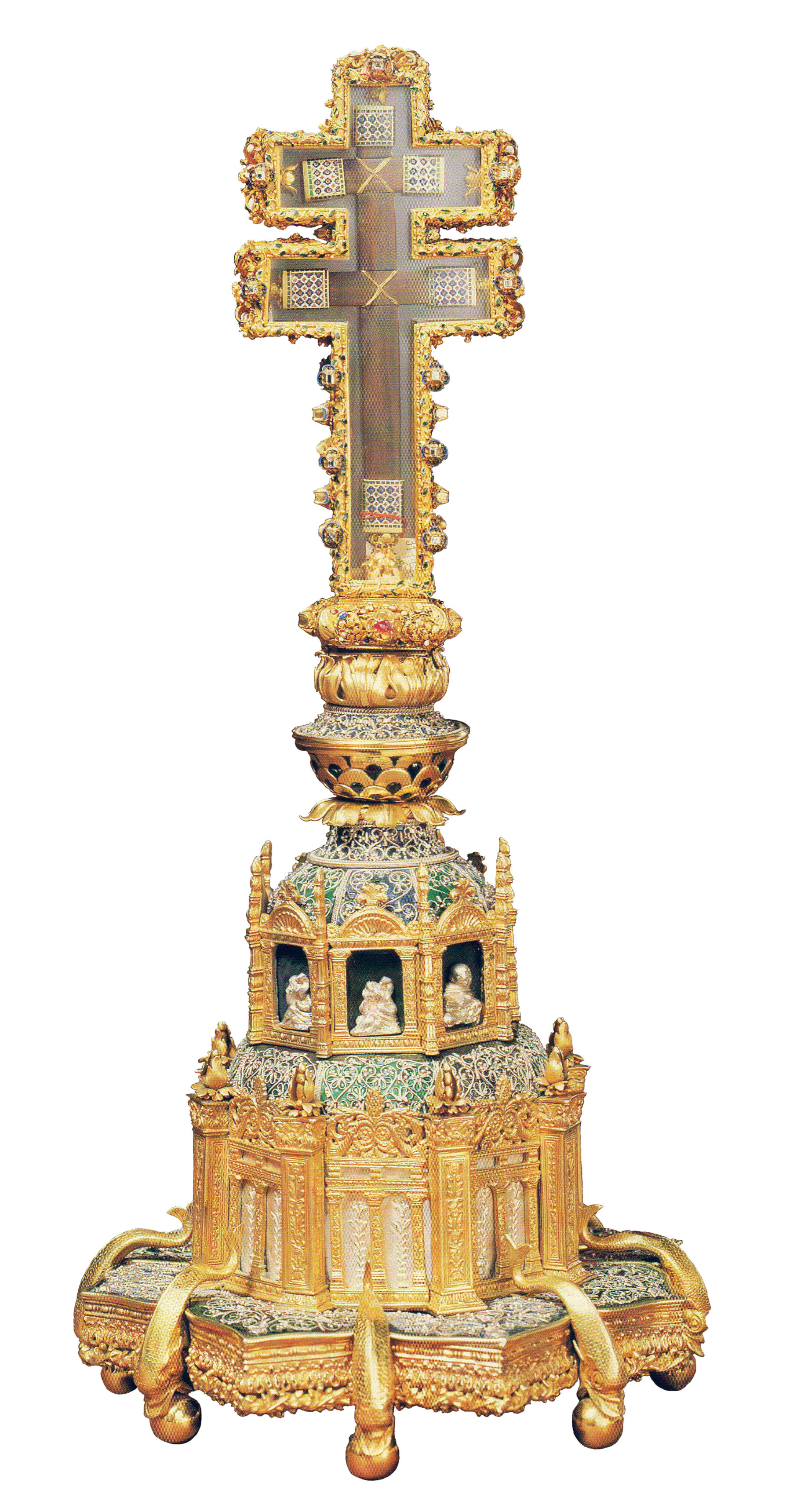 reliquiario2.jpg